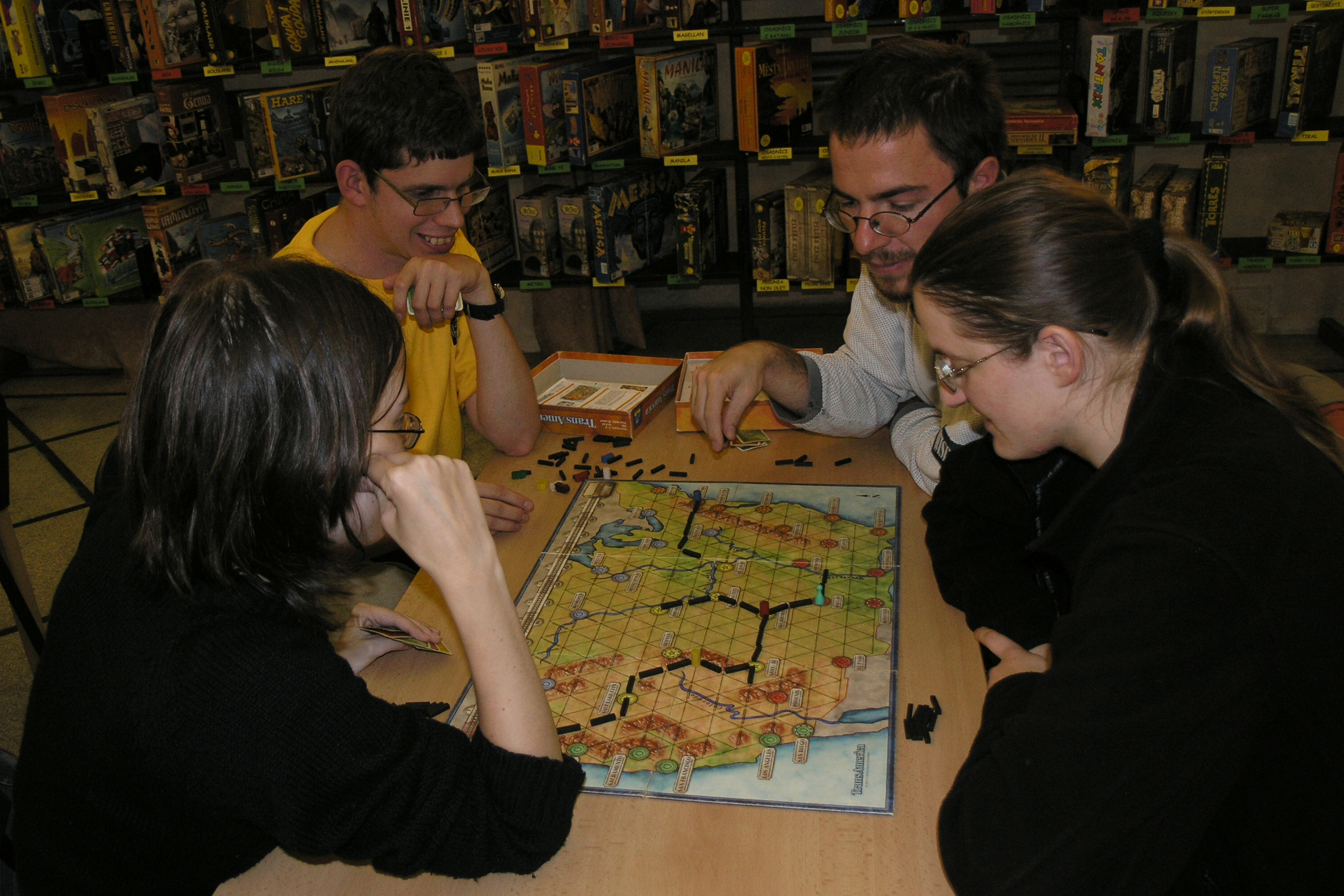 Herní festival Deskohraní 2008 - Trans America